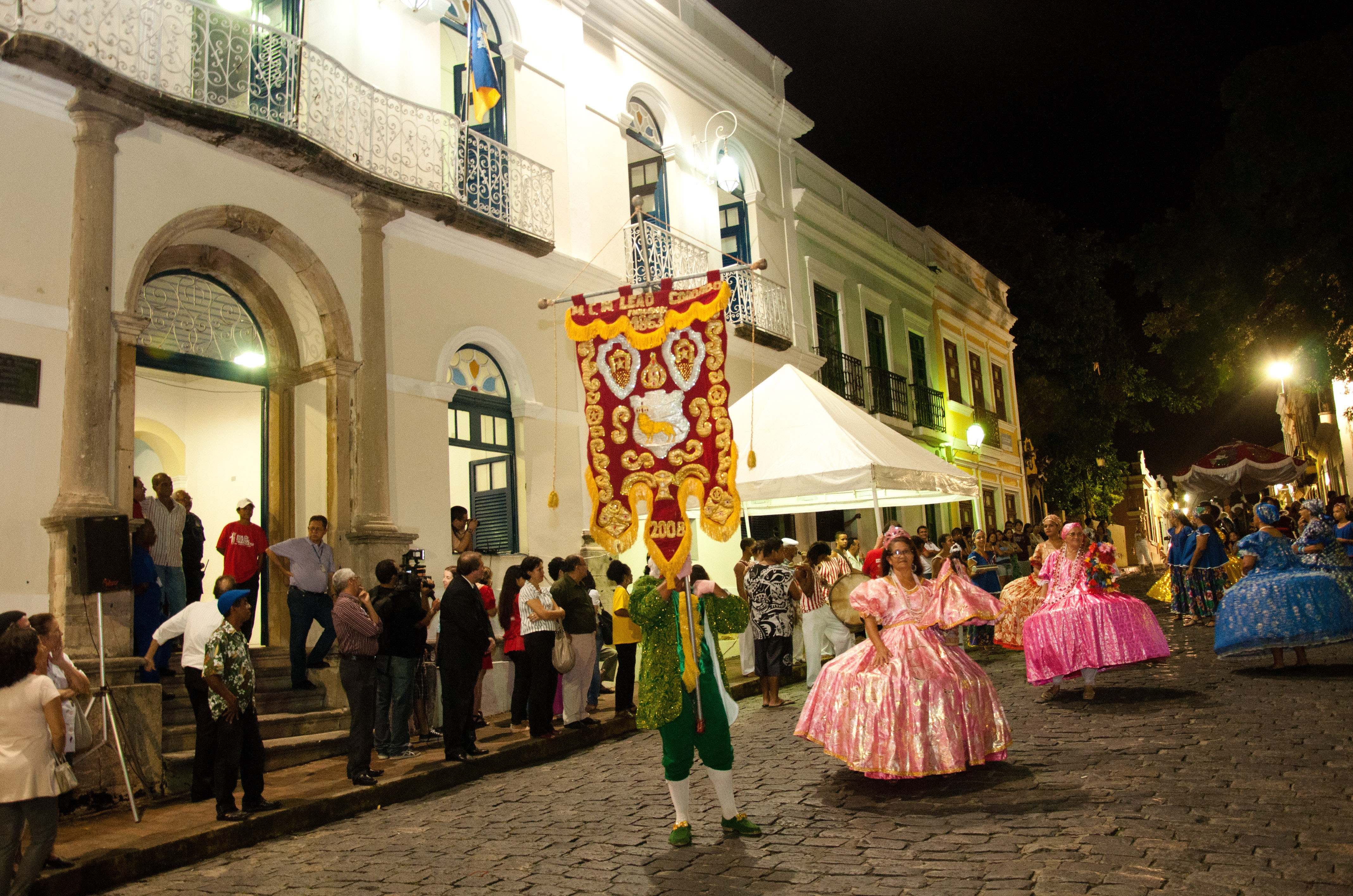 Maracatu Nação - Olinda, Pernambuco, Brasil. Comemoração do Dia Estadual do Maracatu O Dia Estadual do Maracatu, instituído em 1997, foi comemorado em 1º de agosto com a apresentação dos grupos olindenses Leão Coroado, Maracatudo Nação Camaleão, Badia, Maracatu Nação Estrela de Olinda, Maracambuco, Axé da Lua e Nação de Luanda, juntamente com algumas batucadas e outros representantes do ritmo. Na data aconteceu uma sessão solene no Palácio dos Governadores. Também foram realizados diversos seminários e oficinas, numa realização da Secretaria de Patrimônio e Cultura de Olinda, em conjunto com o Instituto de Cooperação Econômica Internacional (ICEI), o Maracatudo Nação Camaleão e a Associação dos Maracatus de Olinda (AMO).